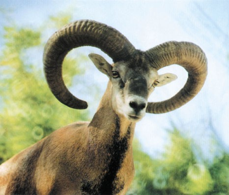 Αγρινό της Κύπρου